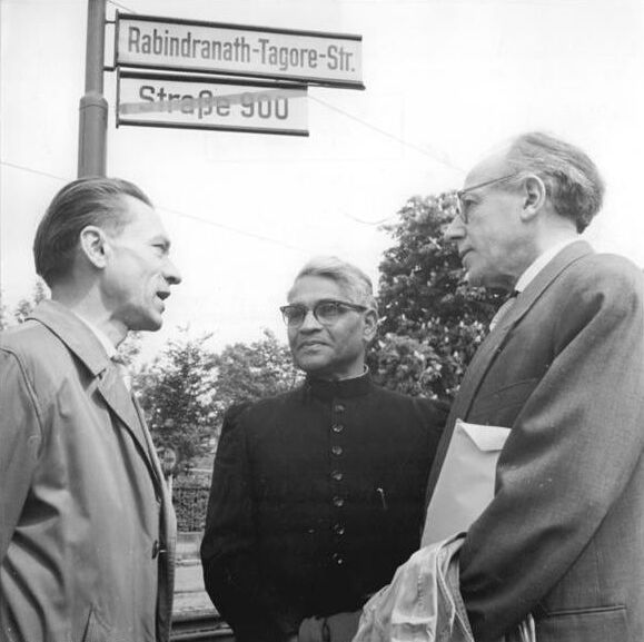 Berlin, Namensgebung Rabindranath-Tagore-Straße Zentralbild Stöhr 6.5.1961 Straßenumbenennung zu Ehren von Rabindranath Tagore. Am Vorabend des 100. Geburtstages des großen indischen Humanisten und Dichters Rabindranath Tagore wurde am 6.5.1961 in Berlin-Grünau die Straße 900 in Rabindranath-Tagore-Straße umbenannt. Anlässlich der feierlichen Namensgebung hatten sich unter anderem der indische Gastprofessor an der Humboldt-Universität Prof. Nohamad Asraf, der Direktor des Institus für Indienkunde an der Humboldt-Universität Prof. Dr. Ruben sowie weitere Mitarbeiter des Institutes und Einwohner von Grünau eingefunden. UBz: Bezirksbürgermeister von Köpenick Fritz Schiller im Gespräch mit Prof. Asraf (Mitte) und Prof. Dr. [Walter] Ruben (rechts) . Abgebildete Personen: Schiller, Fritz: Bezirksbürgermeister von Berlin-Köpenick, DDR Ruben, Walter Prof. Dr.: Indologe, Direktor Institut für Orientforschung Akademie der Wissenschaften (AdW) Berlin, DDR (GND 118603531)